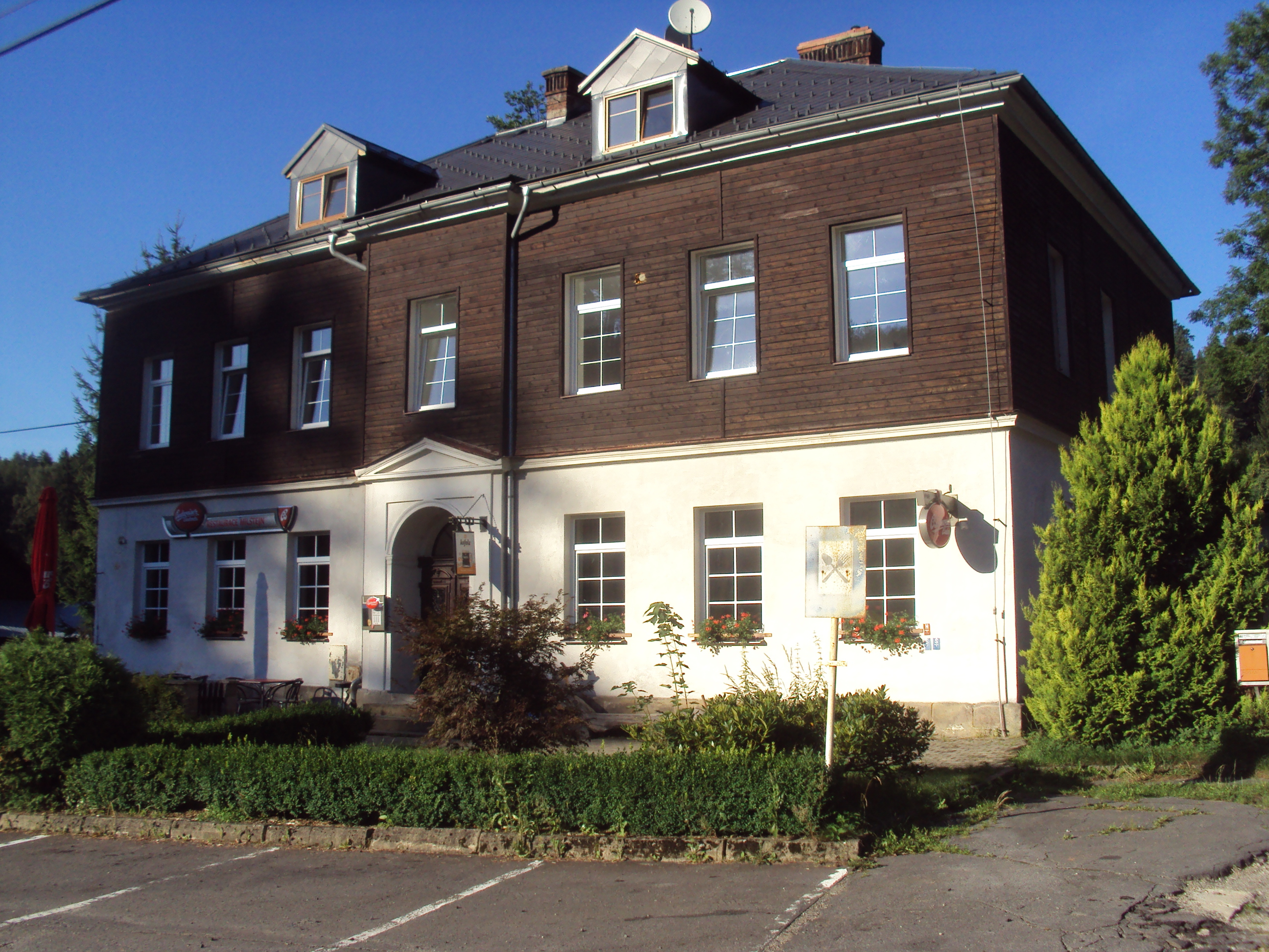 Česky: Restaurace v Rousínově 68